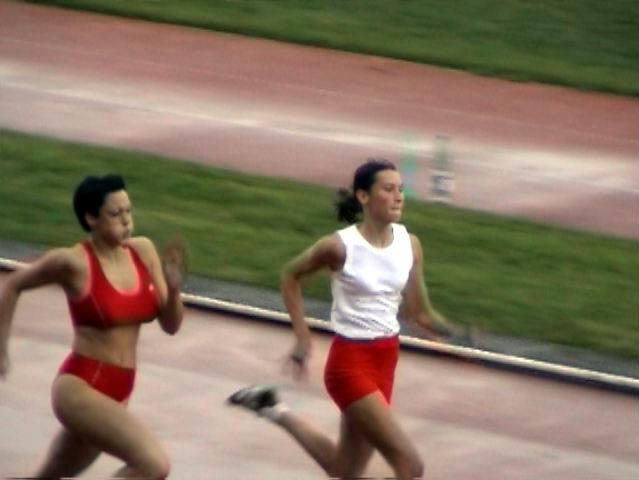 Kateřina Burešová a Jitka Bartoničková